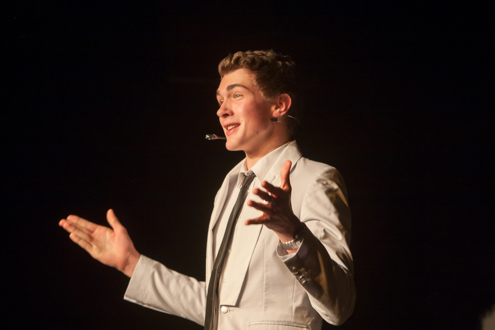 Bild von Timon Krause